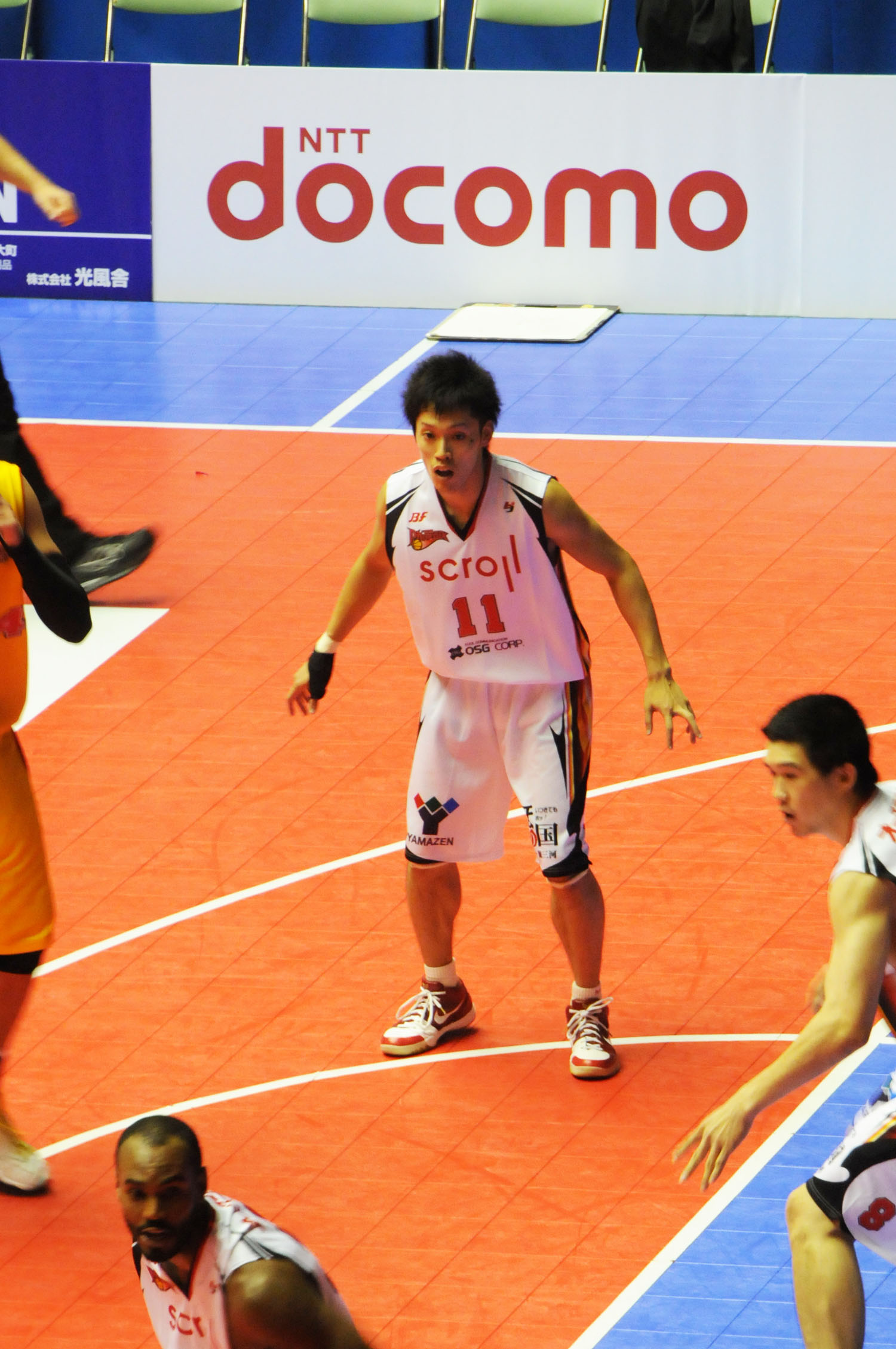 浜松・東三河フェニックスの岡田慎吾選手。秋田県立体育館で。